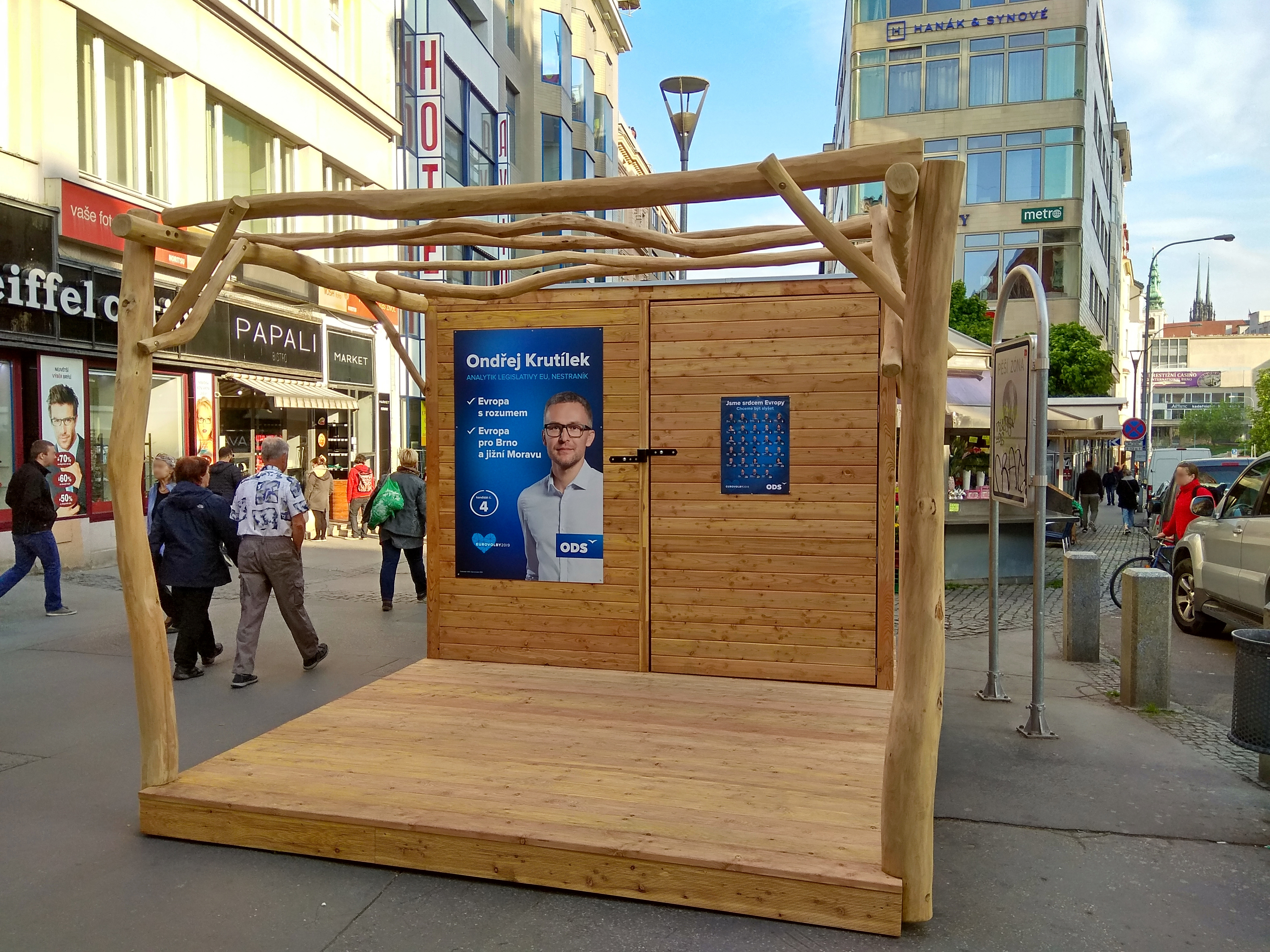 Předvolební stánek Občanské demokratické strany (ODS) 30. dubna 2019 před květnovými volbami do Evropského parlamentu. Umístěný tradičně na křižovatce ulic Česká, Veselá a Solniční v centru Brna.